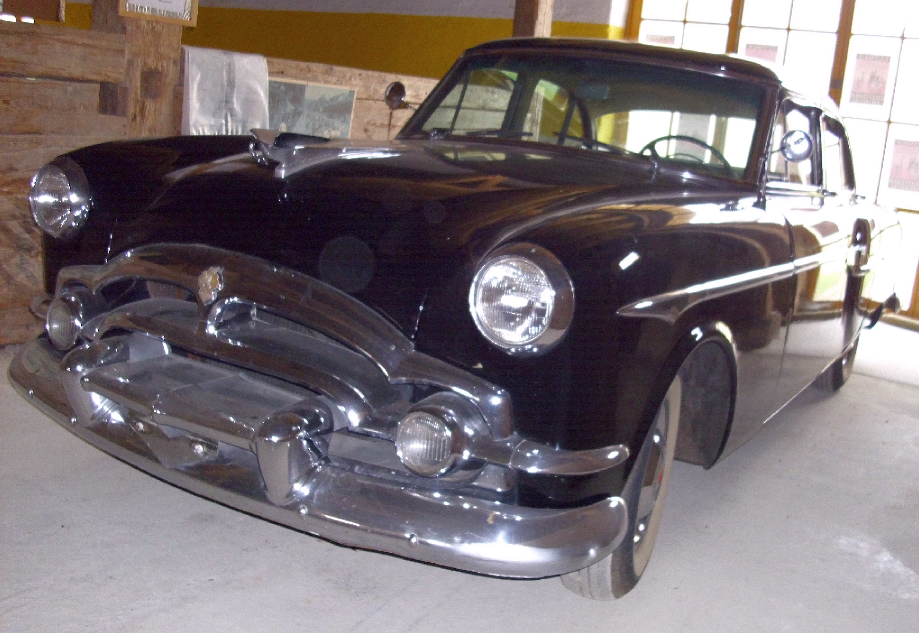 Packard Clipper Deluxe Touring Sedan Model 2662 1953